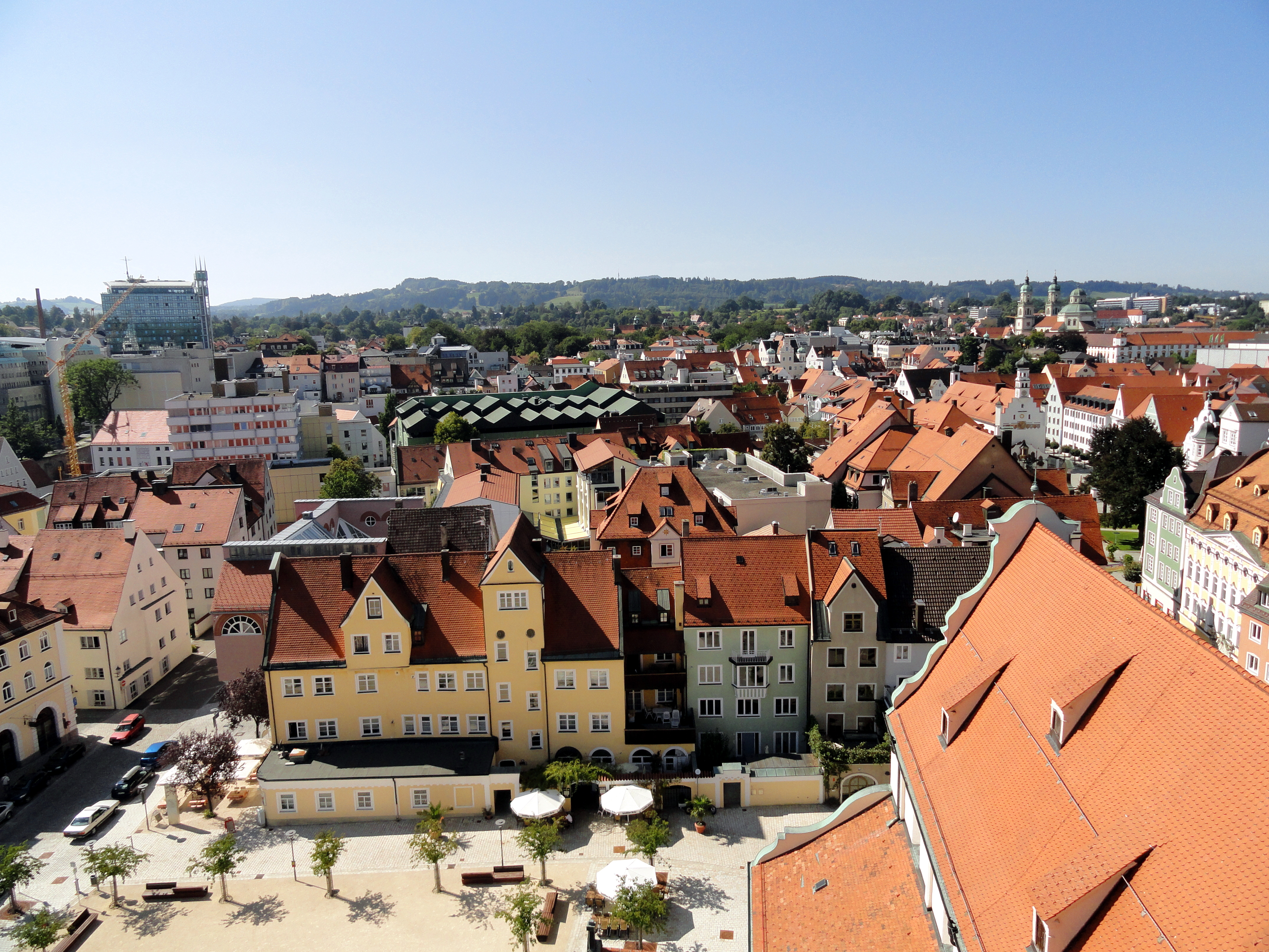 Blick vom Kirchturm der St. Mang-Kirche nach Norden.